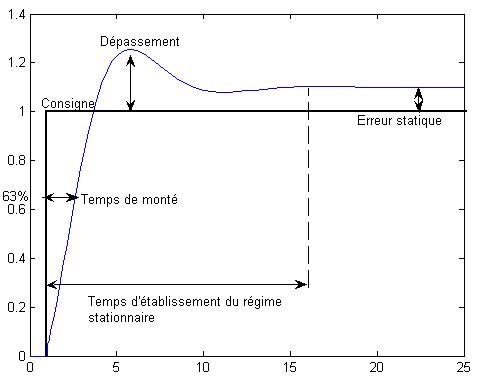 réponse à une consigne en échelon d'un système du premier ordre contrôlé par un PID